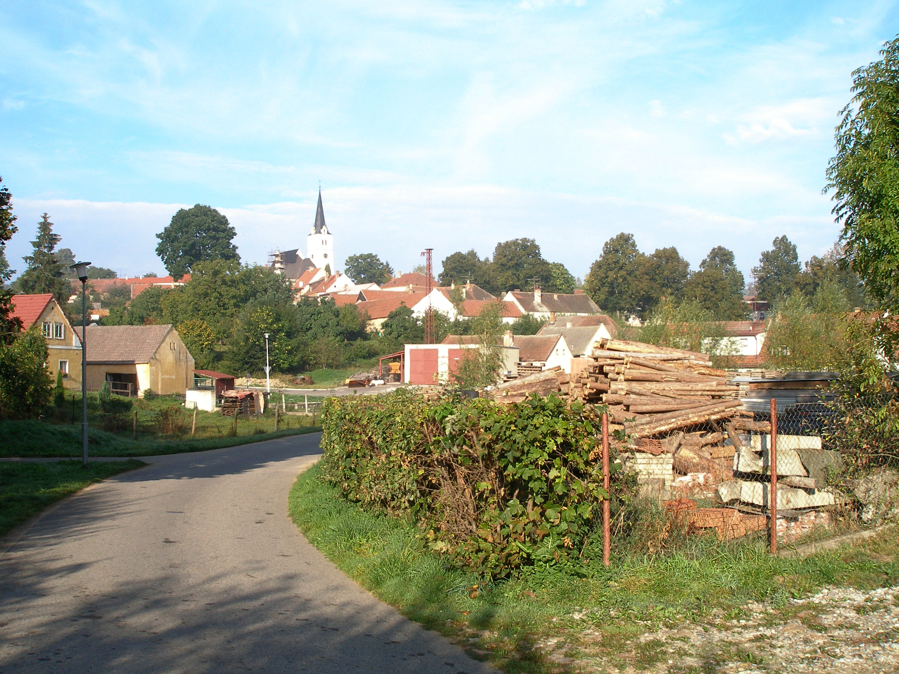 Přídolí (Priethal) - celkový pohled od východu